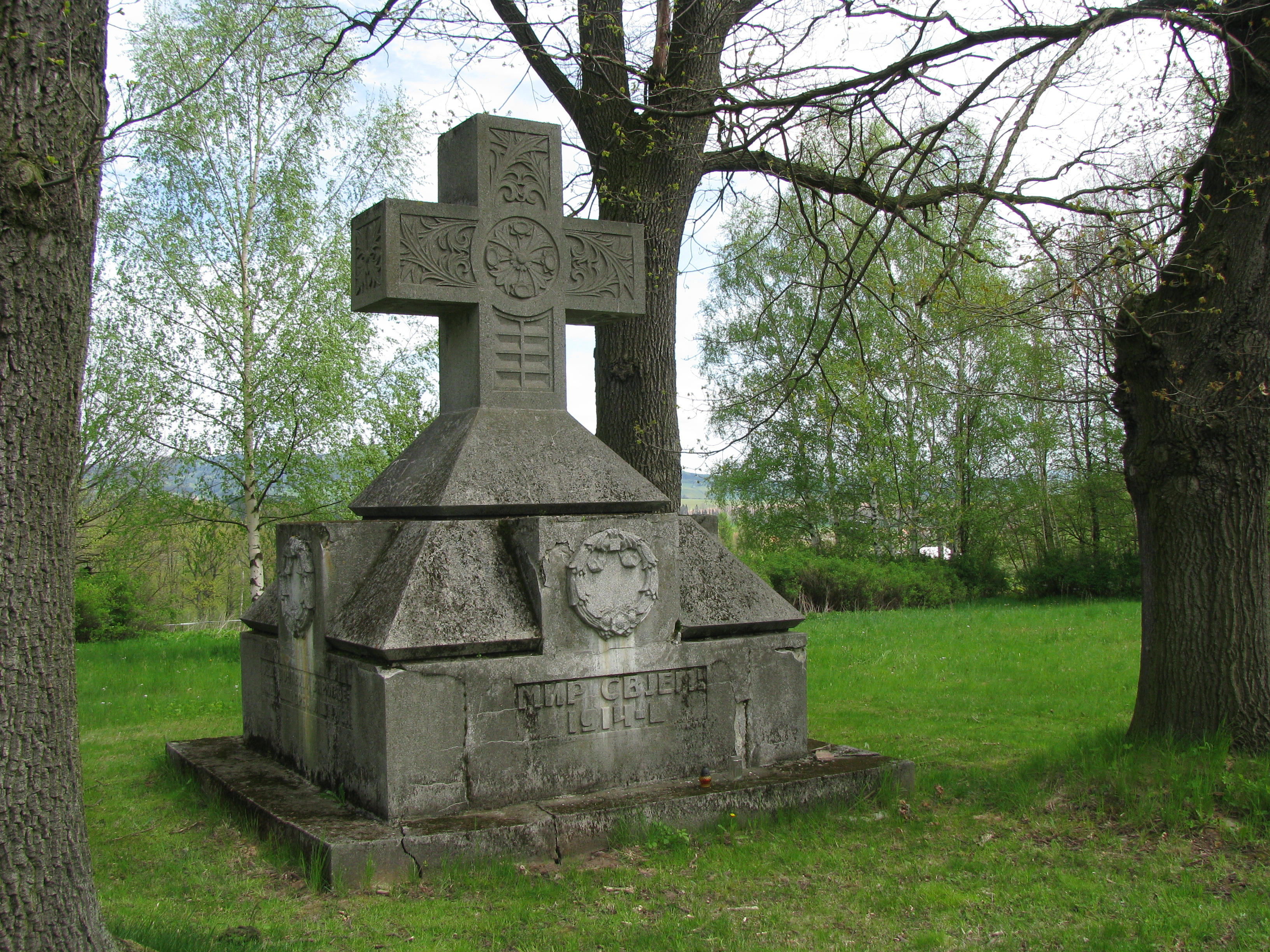 Vojenský hřbitov (Martínkovice)